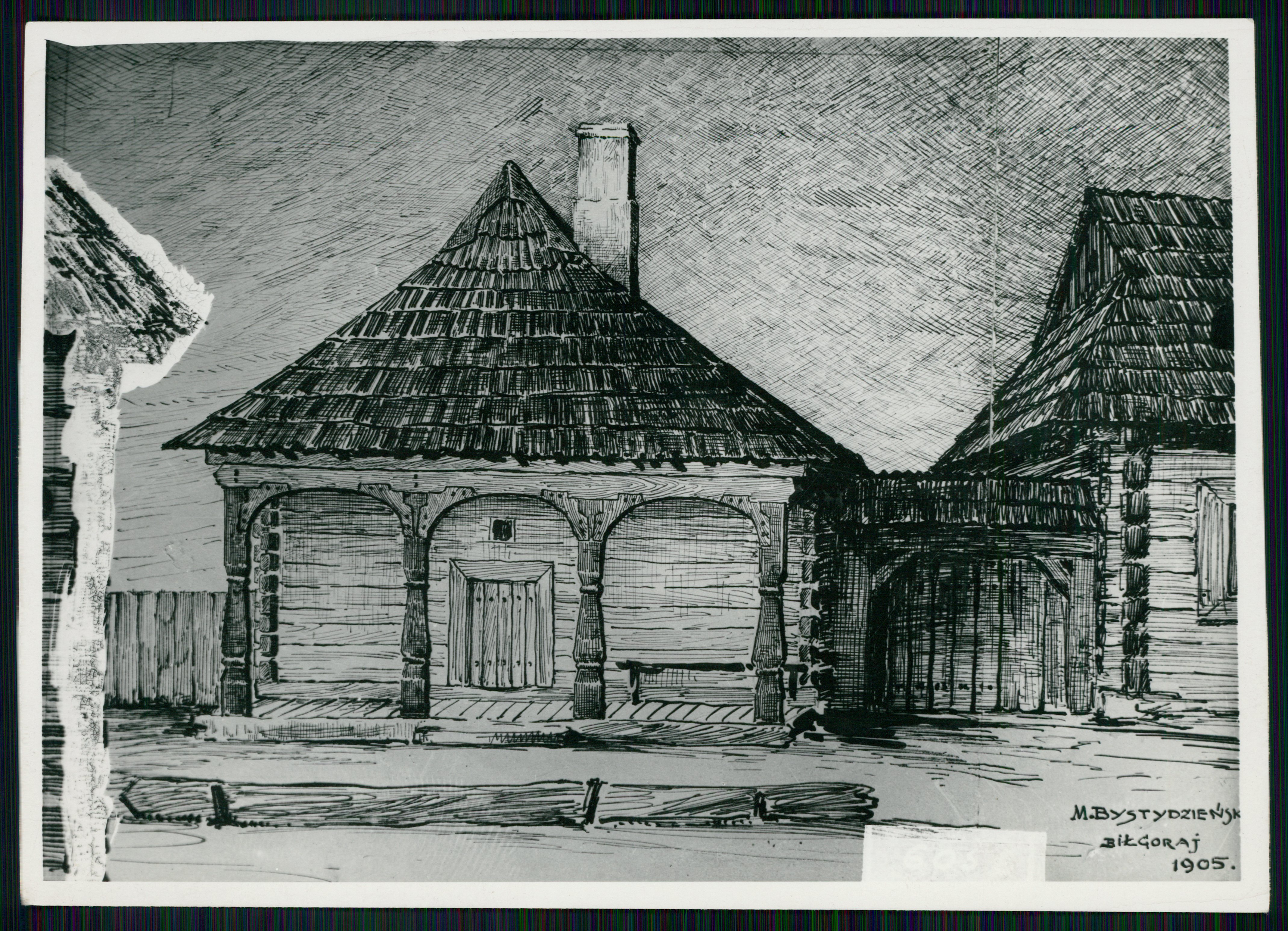 Tradycyjny dom biłgorajski, rysunek Maksymiliana Bystydzieńskiego.